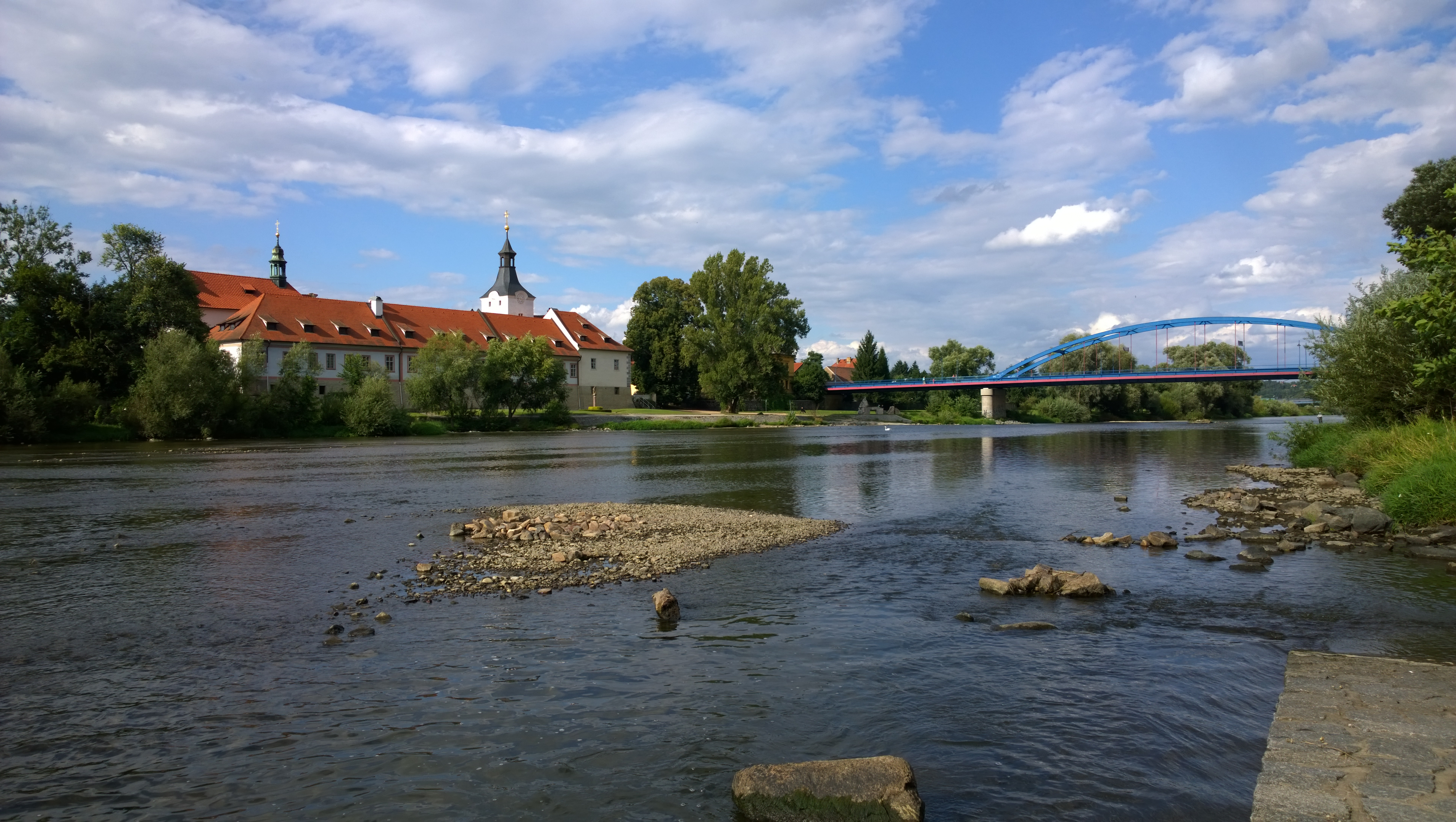 Pohled na Dobřichovice od kempu